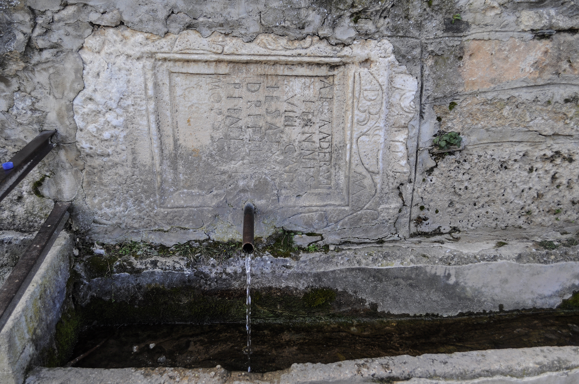 Во чешмата среде село е вградена стара надгробна плоча од римско време